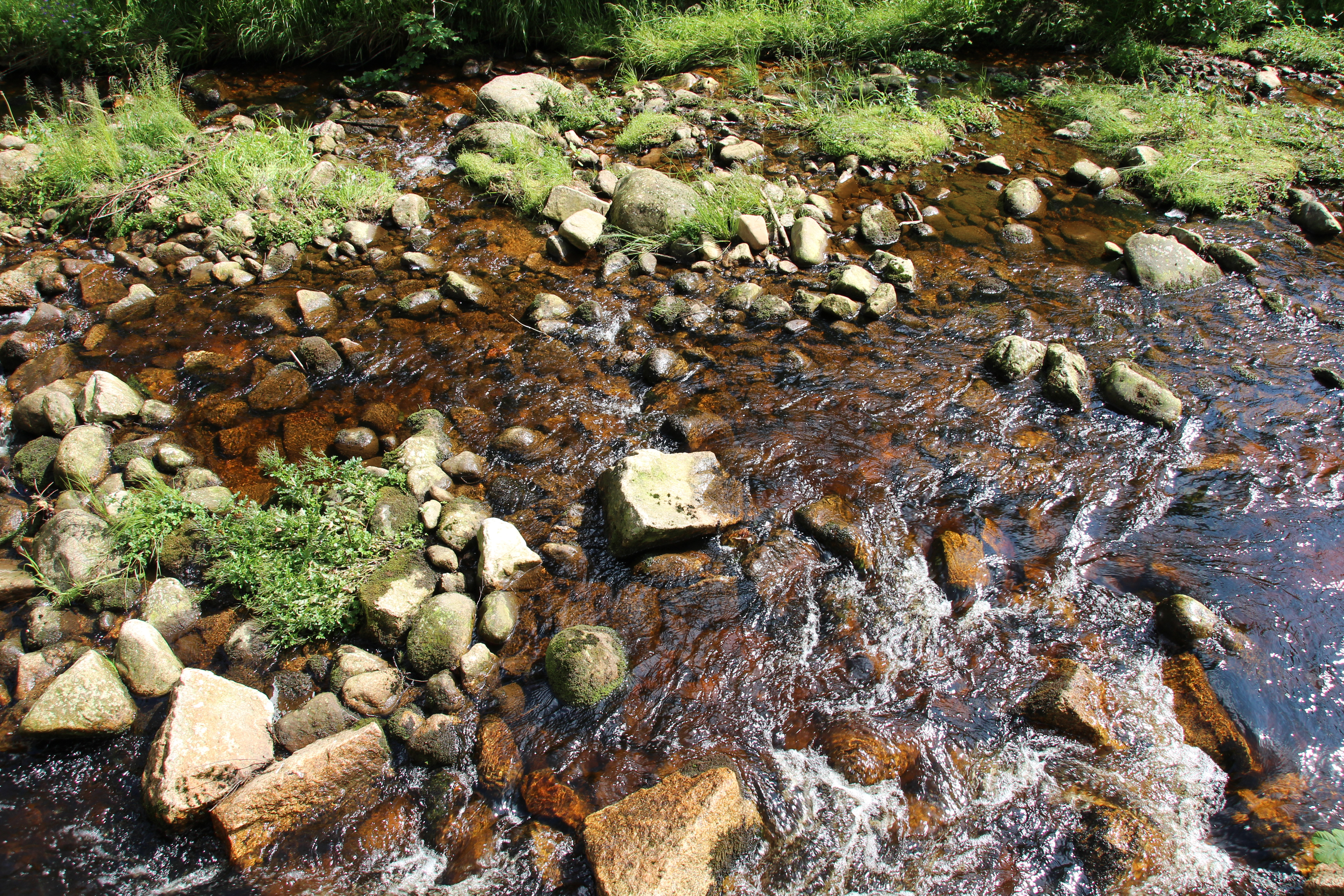 Der Fluß Wilzsch im Bereich der Siedlung Wilzschmühle in einer Höhe von etwa 680 Metern.